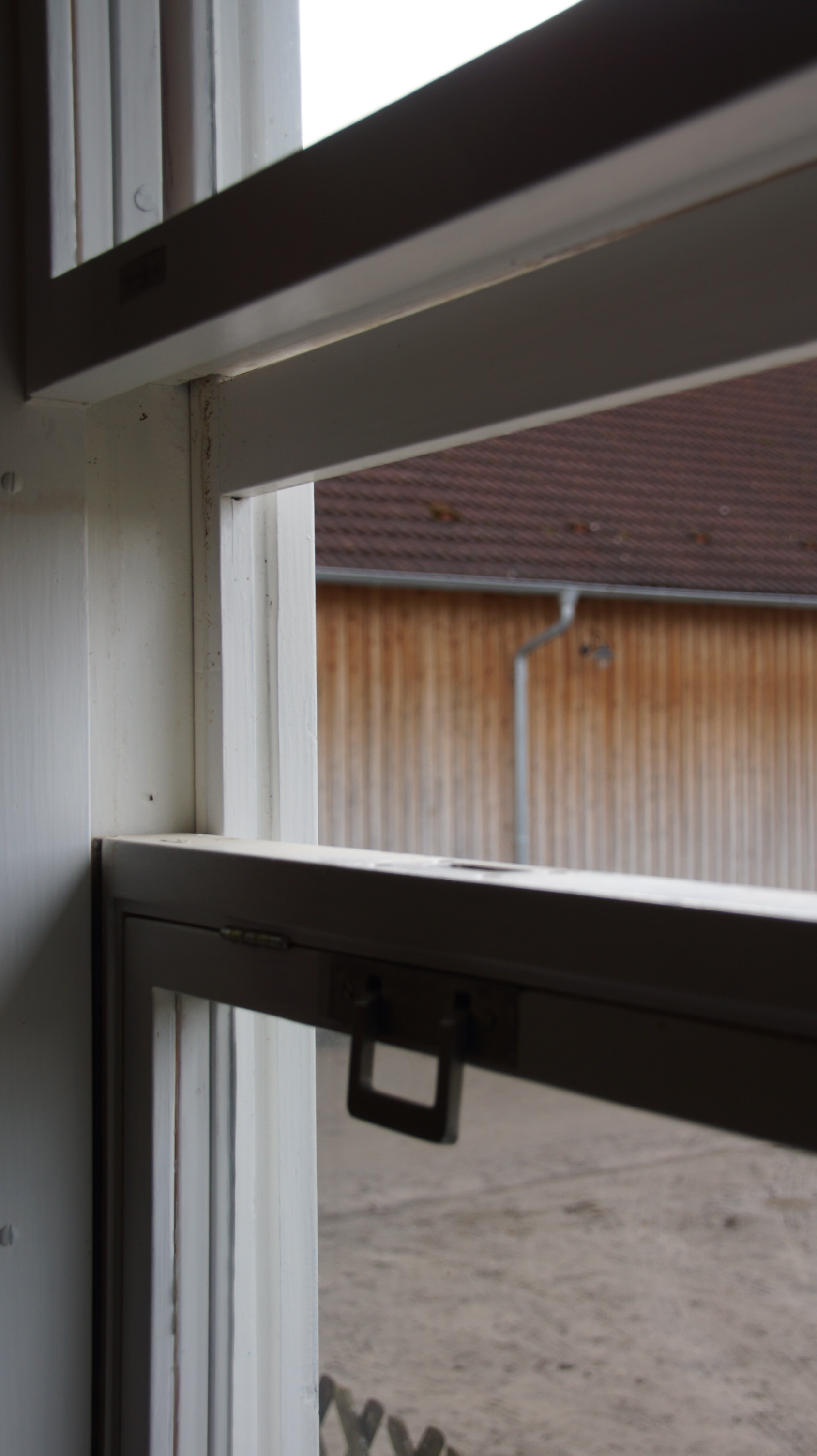 MAN-Stahlhaus im Fränkischen Freilandmuseum Bad Windsheim